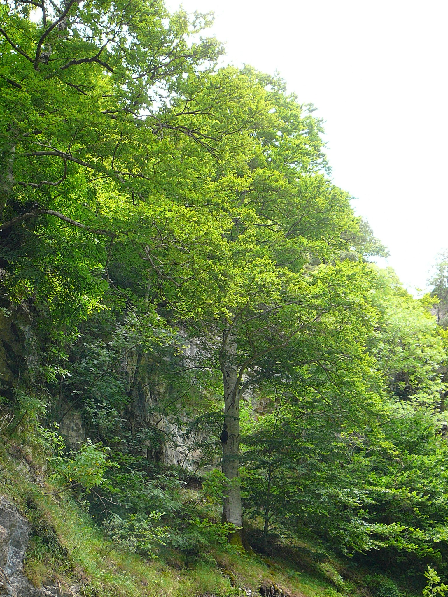 Haya en Somiedo (Asturias)